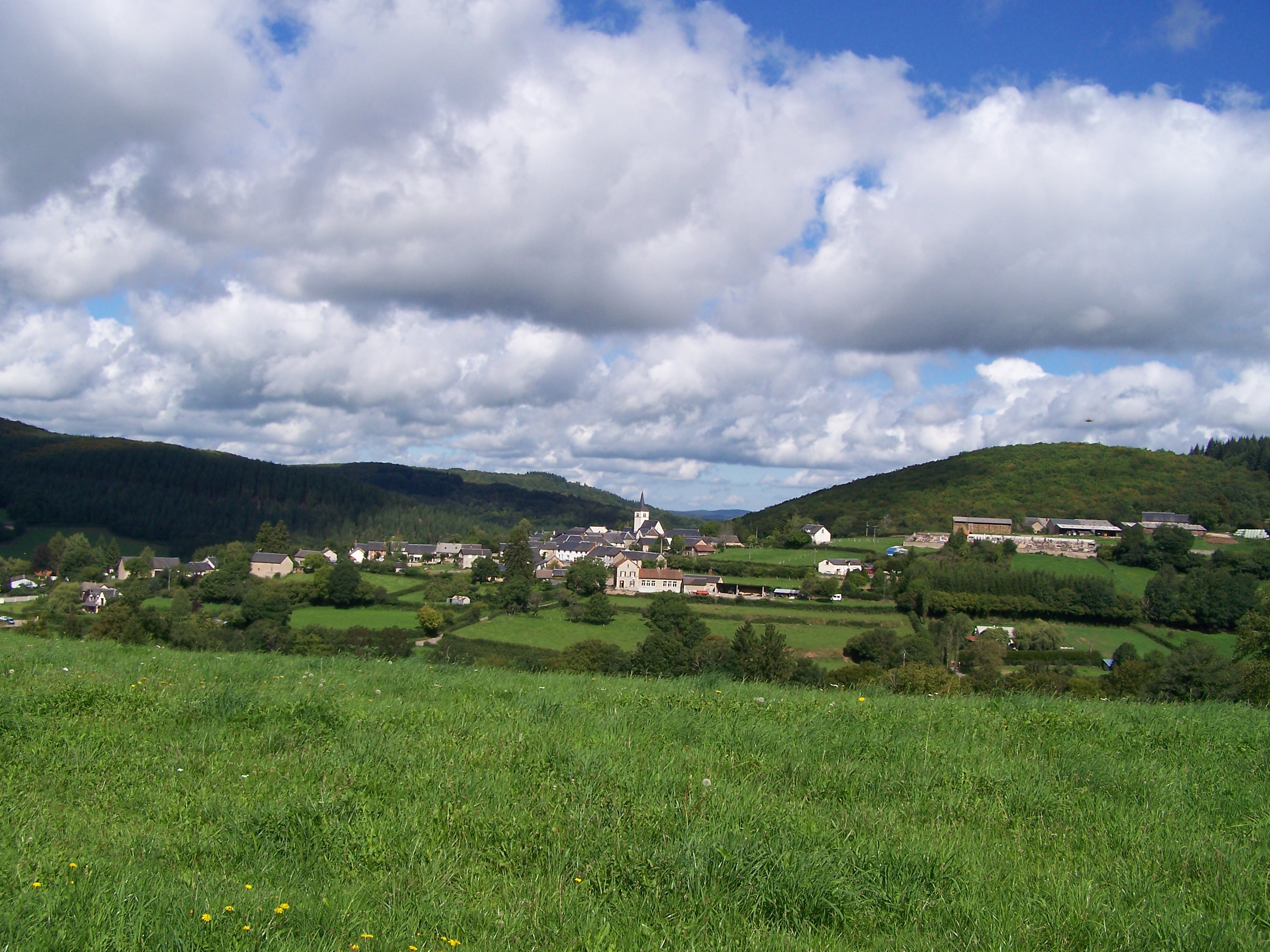 Vue du village de Corancy dans le Morvan (Nièvre, France)